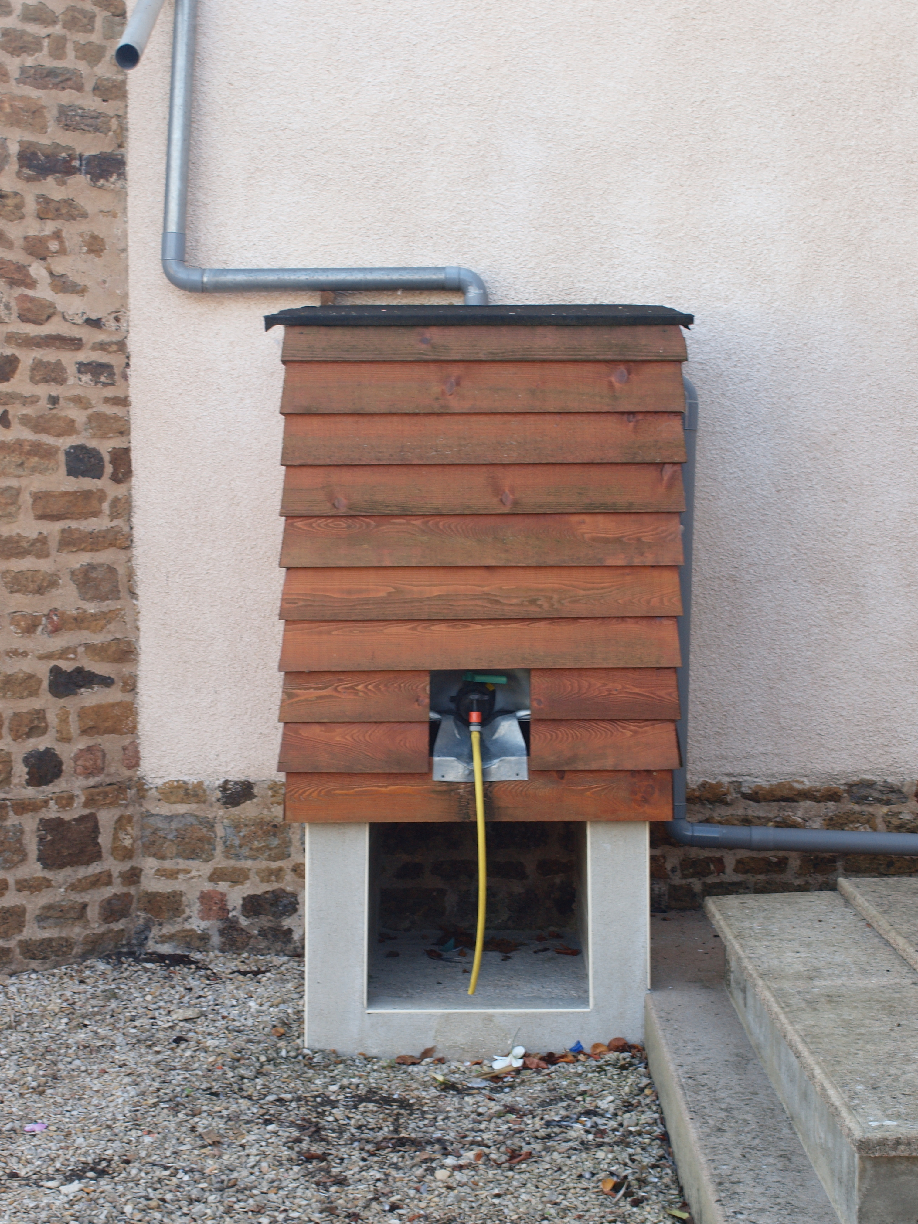 Hauterive (Yonne, France), dans le cimetière, réservoir de récupération des eaux pluviales qui tombent sur le toit de l'église.